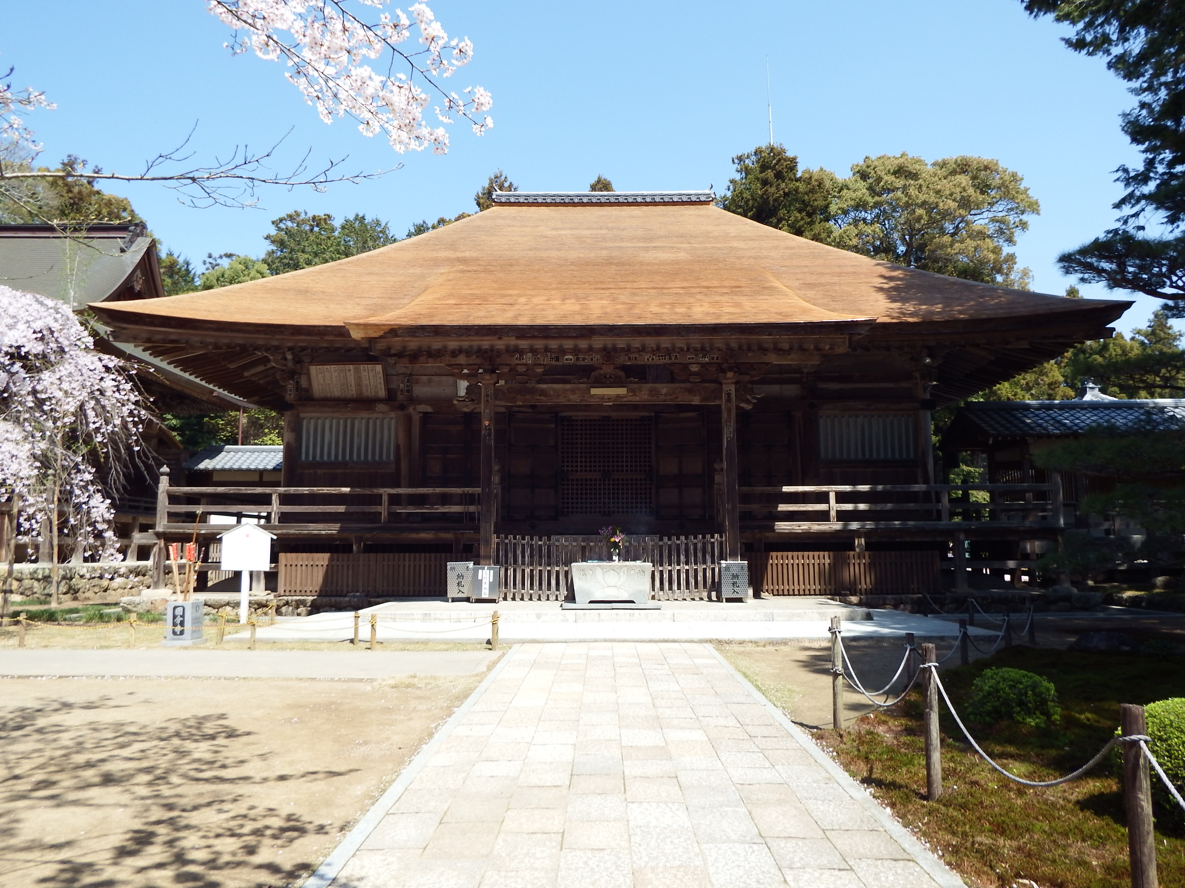 新しく屋根を葺替えられた土佐国分寺本堂